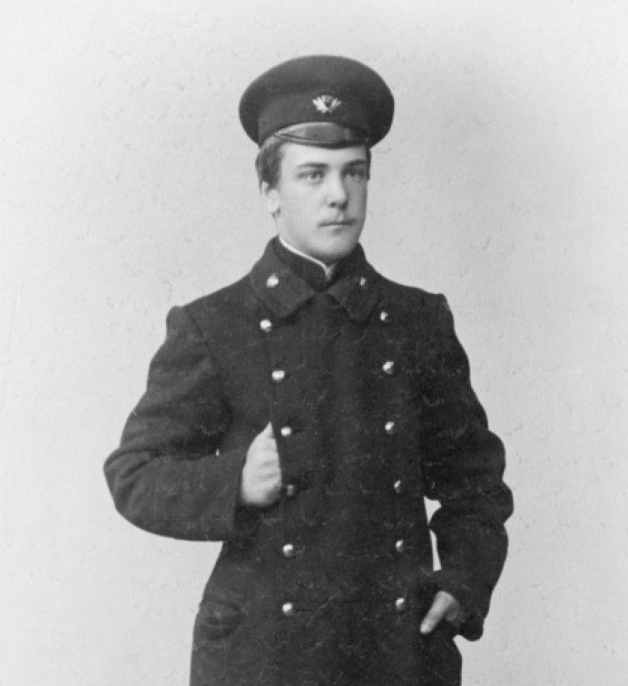 Пётр Капица — учащийся Кронштадтского реального училища